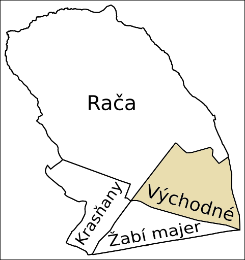 Východné, Rača, Bratislava